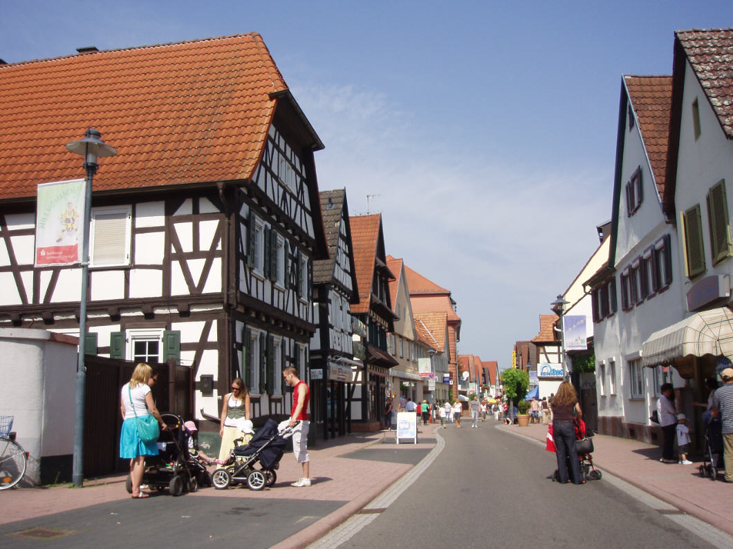 Kandel, Denkmalzone Ortskern: Hauptstraße